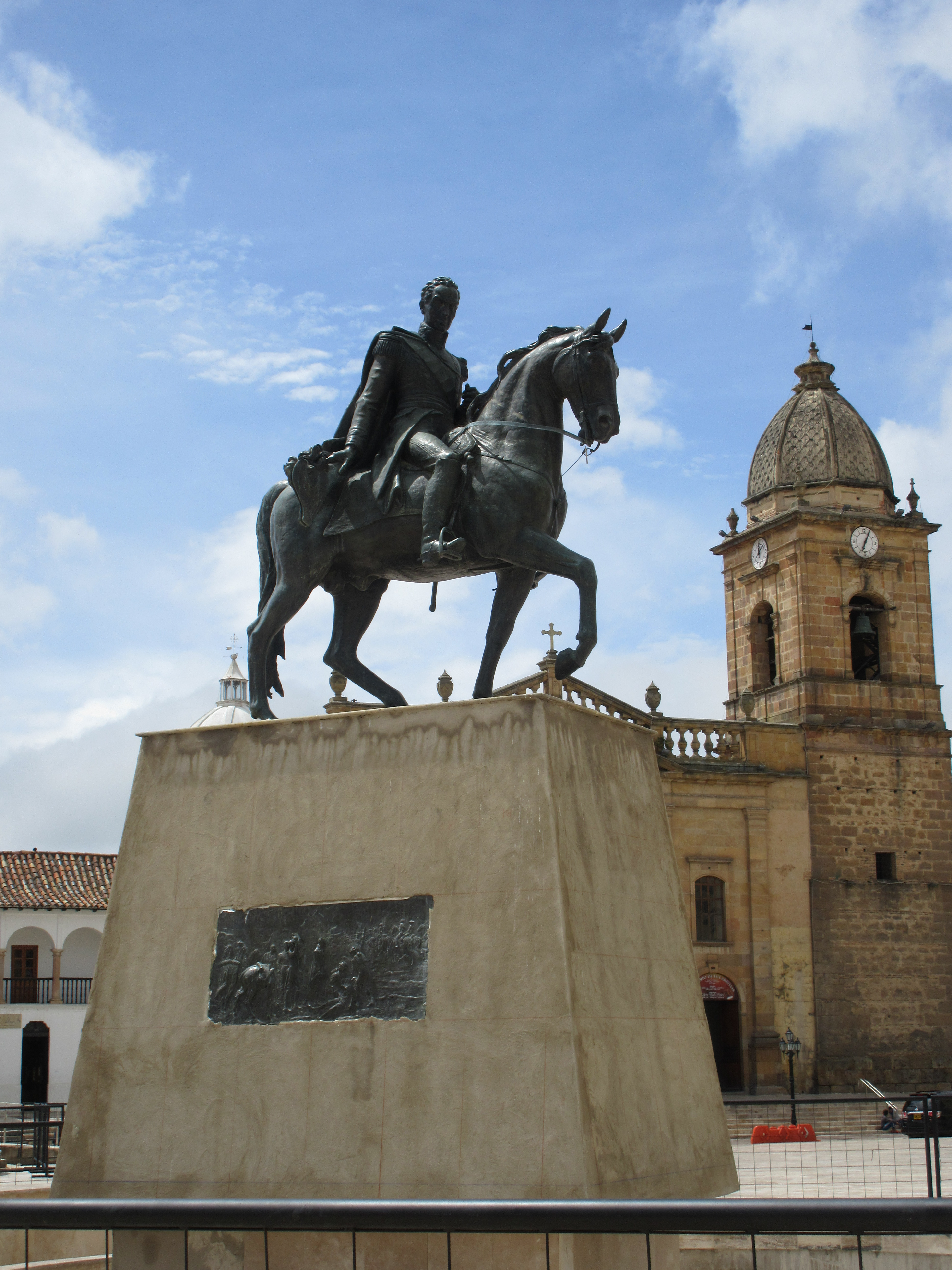 Instalada en la plaza principal de la ciudad de Tunja